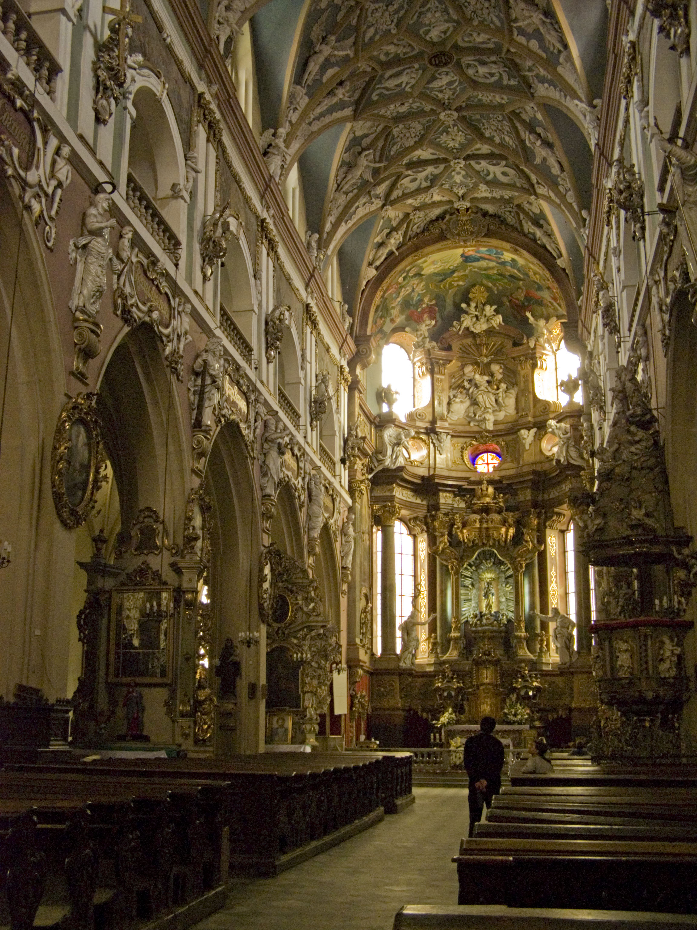 Kłodzko, Kościół Wniebowzięcia Najświętszej Marii Panny